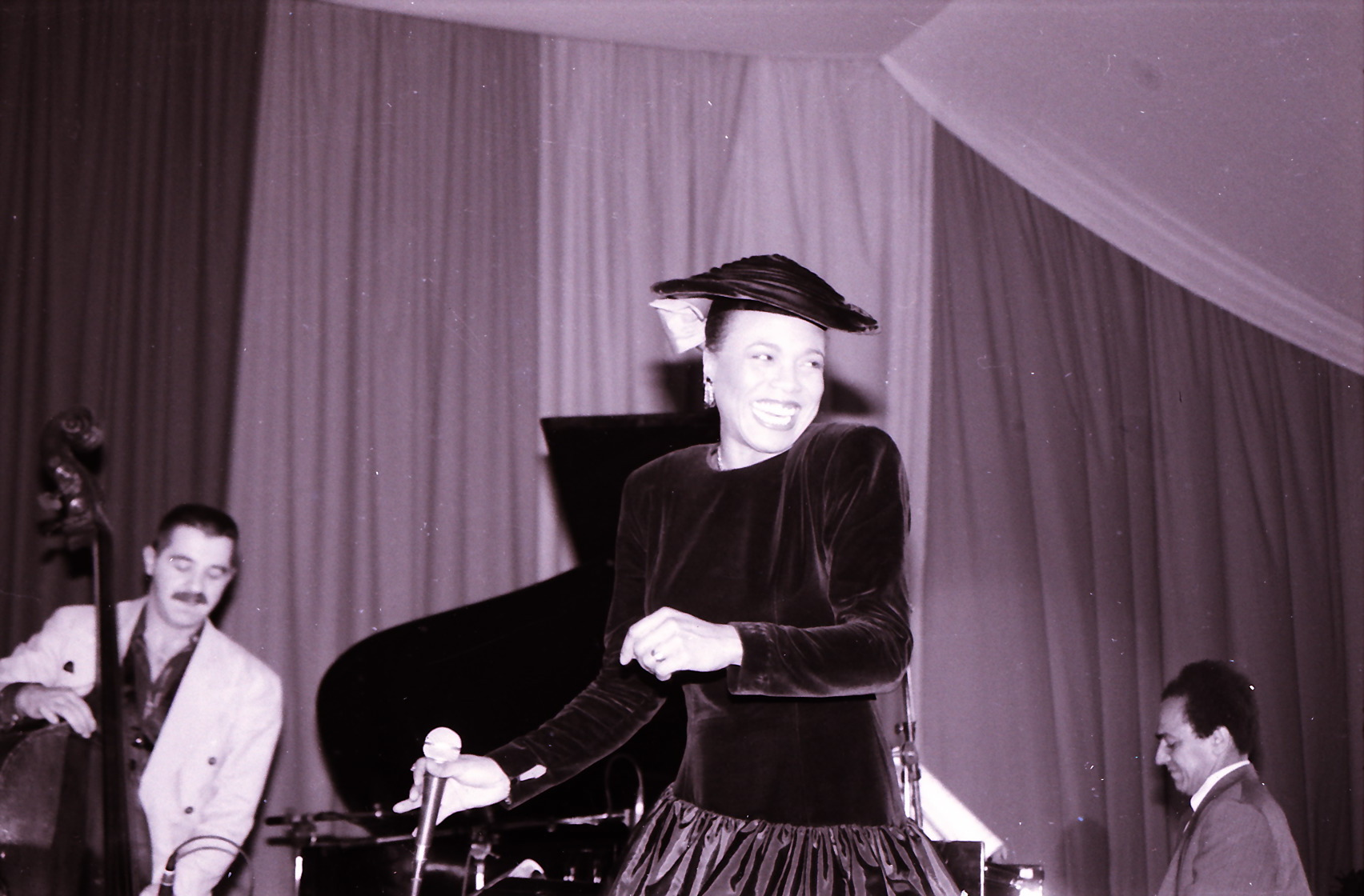 Dee Dee Bridgewater au festival Jazz d'Or de Strasbourg 1990